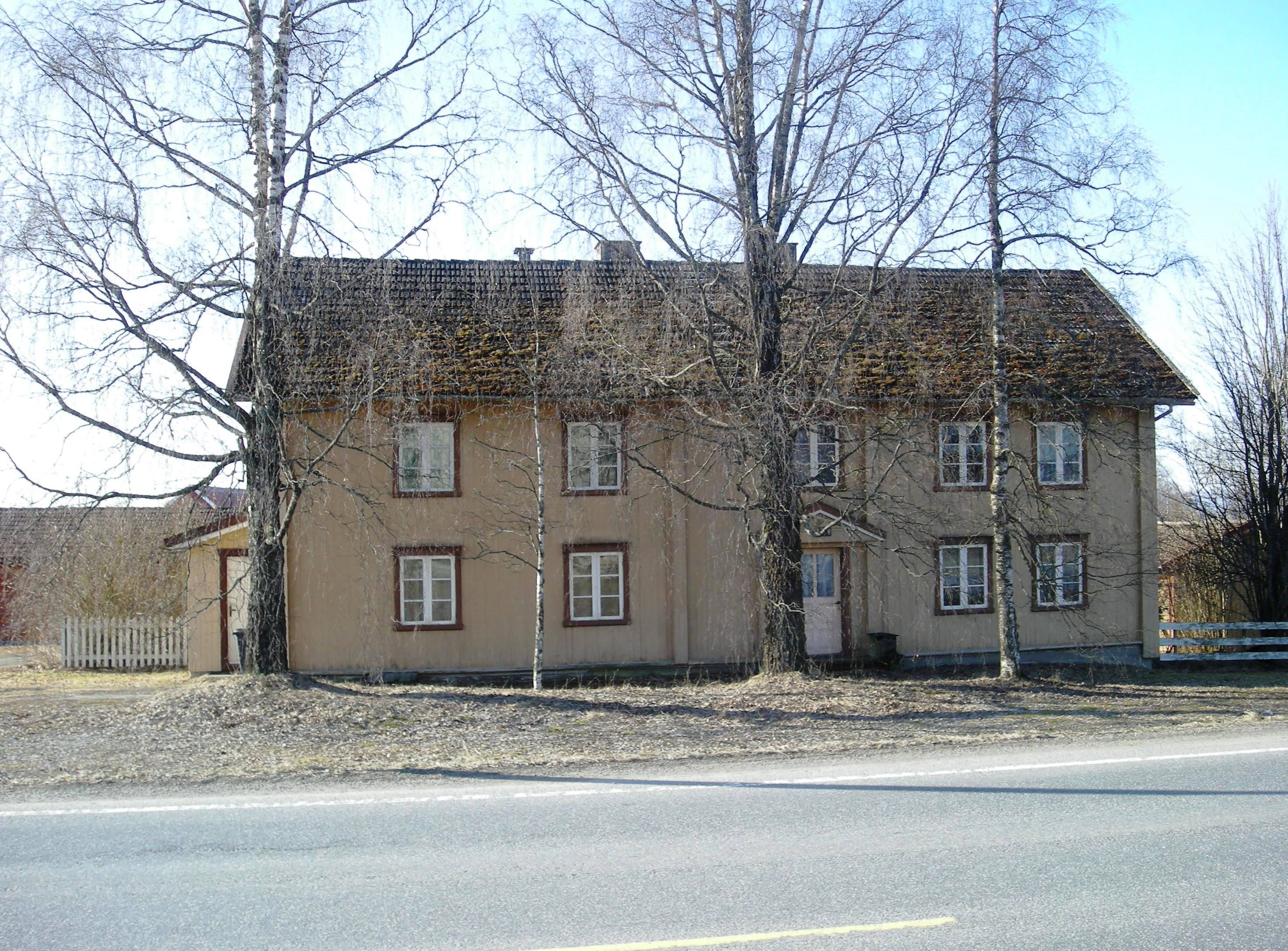 Fylkesvei 1844 (tidl. 166) går mellom Løten kirke og Klokkergården.